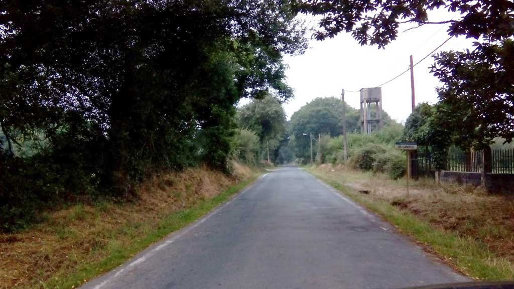 Vista dos Campos, Curtis.